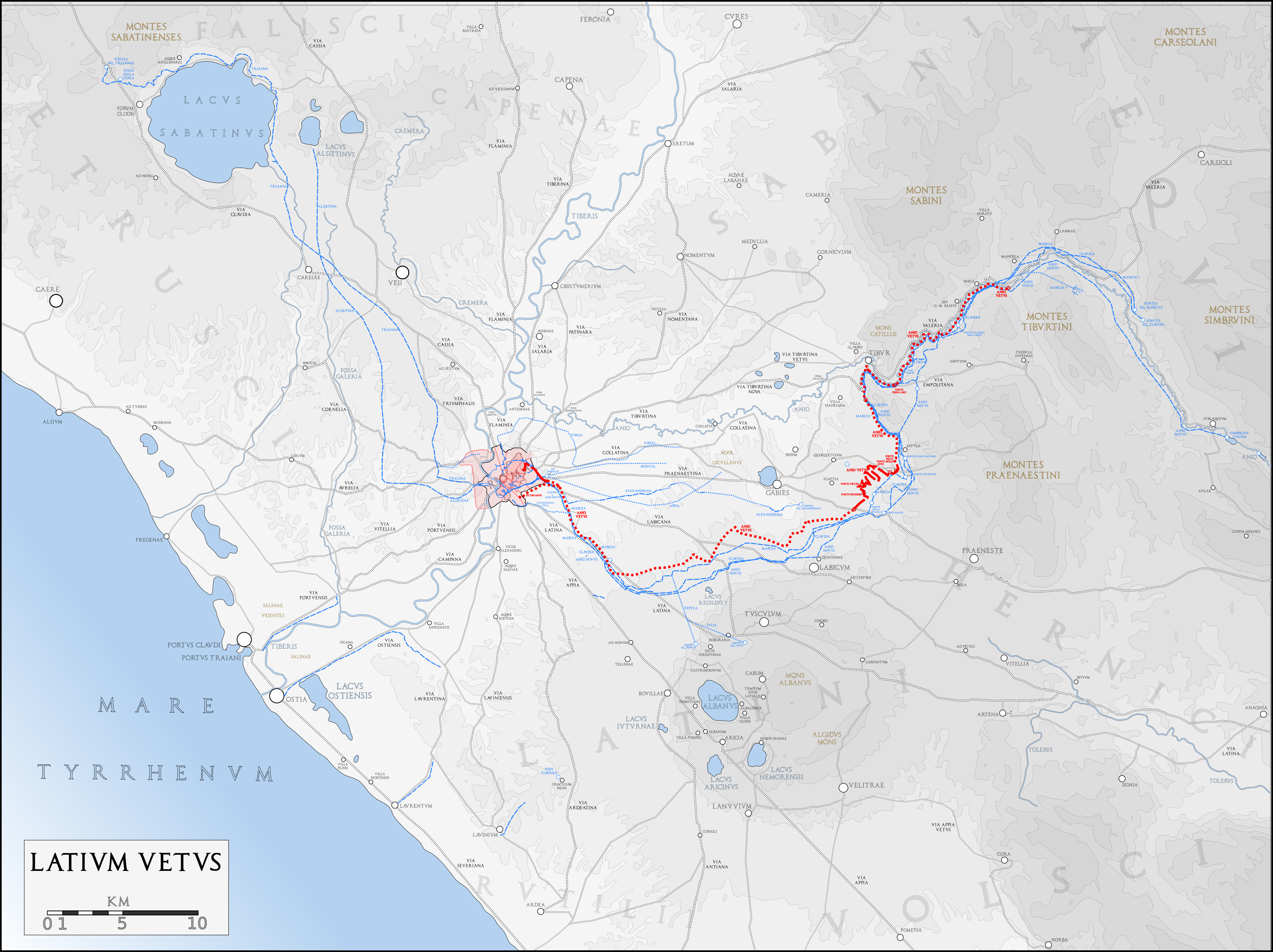 Carte du Latium antique sur lequel figure le tracé des aqueducs de Rome. D'après un fond de carte de 1886 (G. Droysens Allgemeiner Historischer Handatlas).